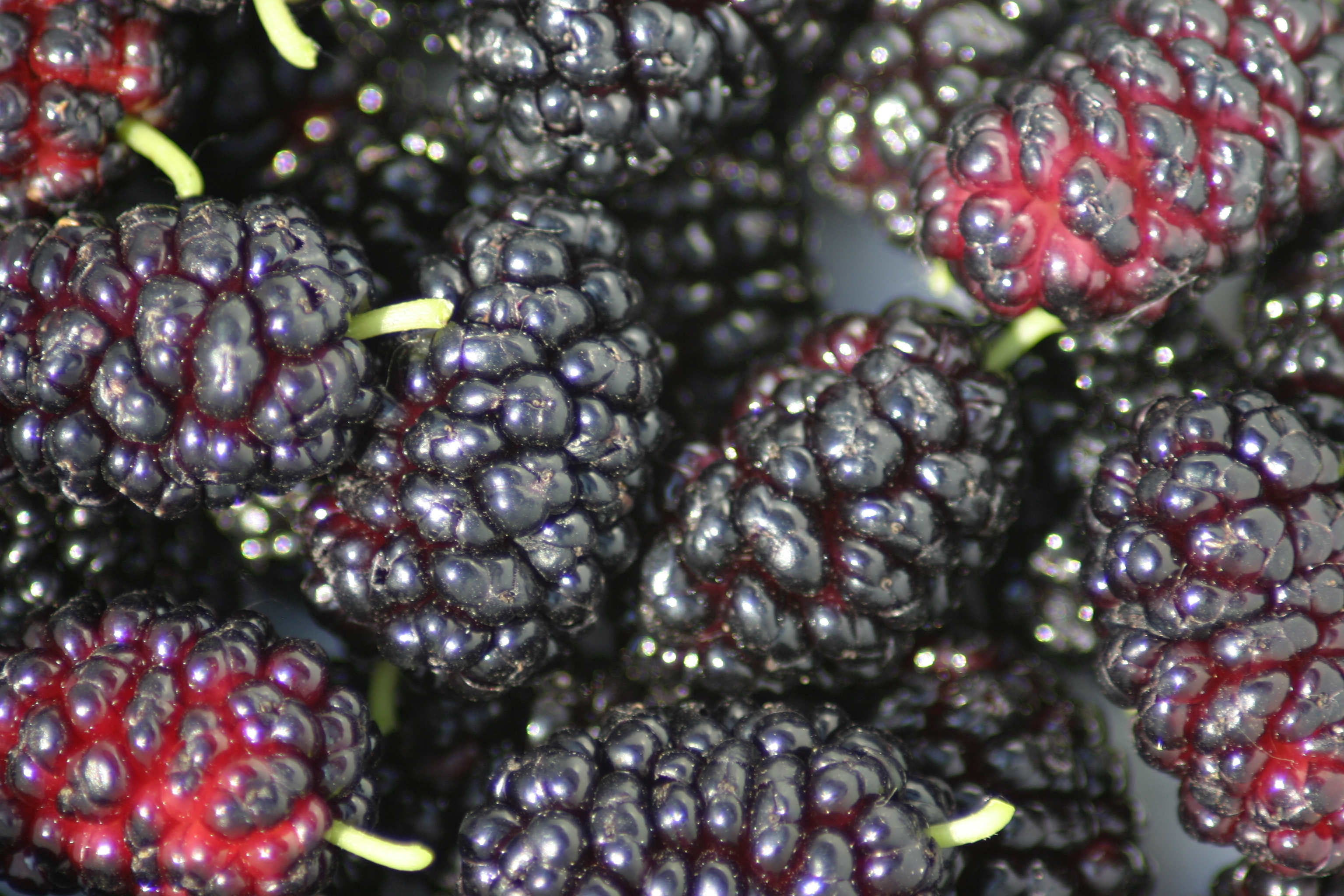 Mulberries (Morus).